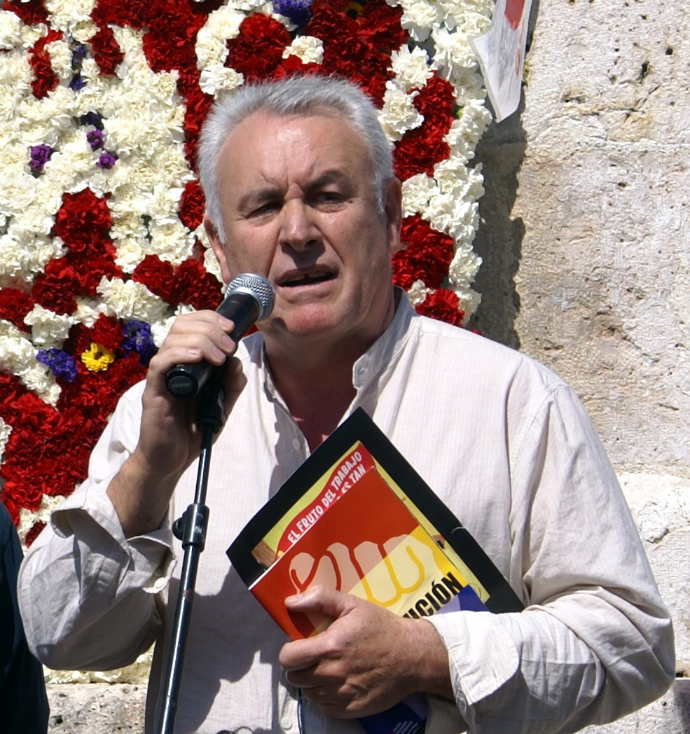 Cayo Lara, coordinador general de Izquierda Unida, en Villalar 2009.